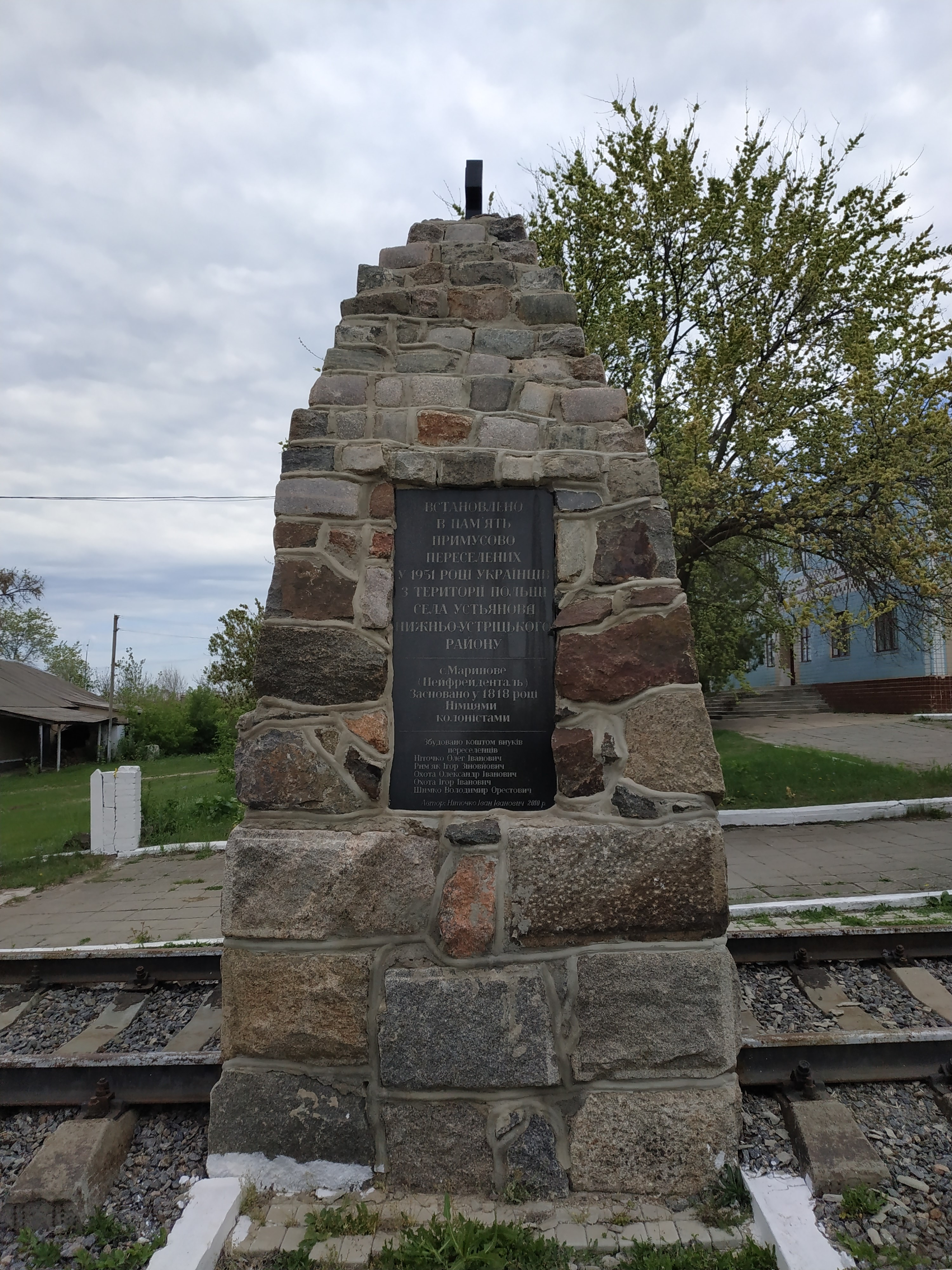 Встановлено в пам’ять примусово переселених у 1951 році українців з території теперіщньої Польщі с. Устянове Нижньо-Устрицького району